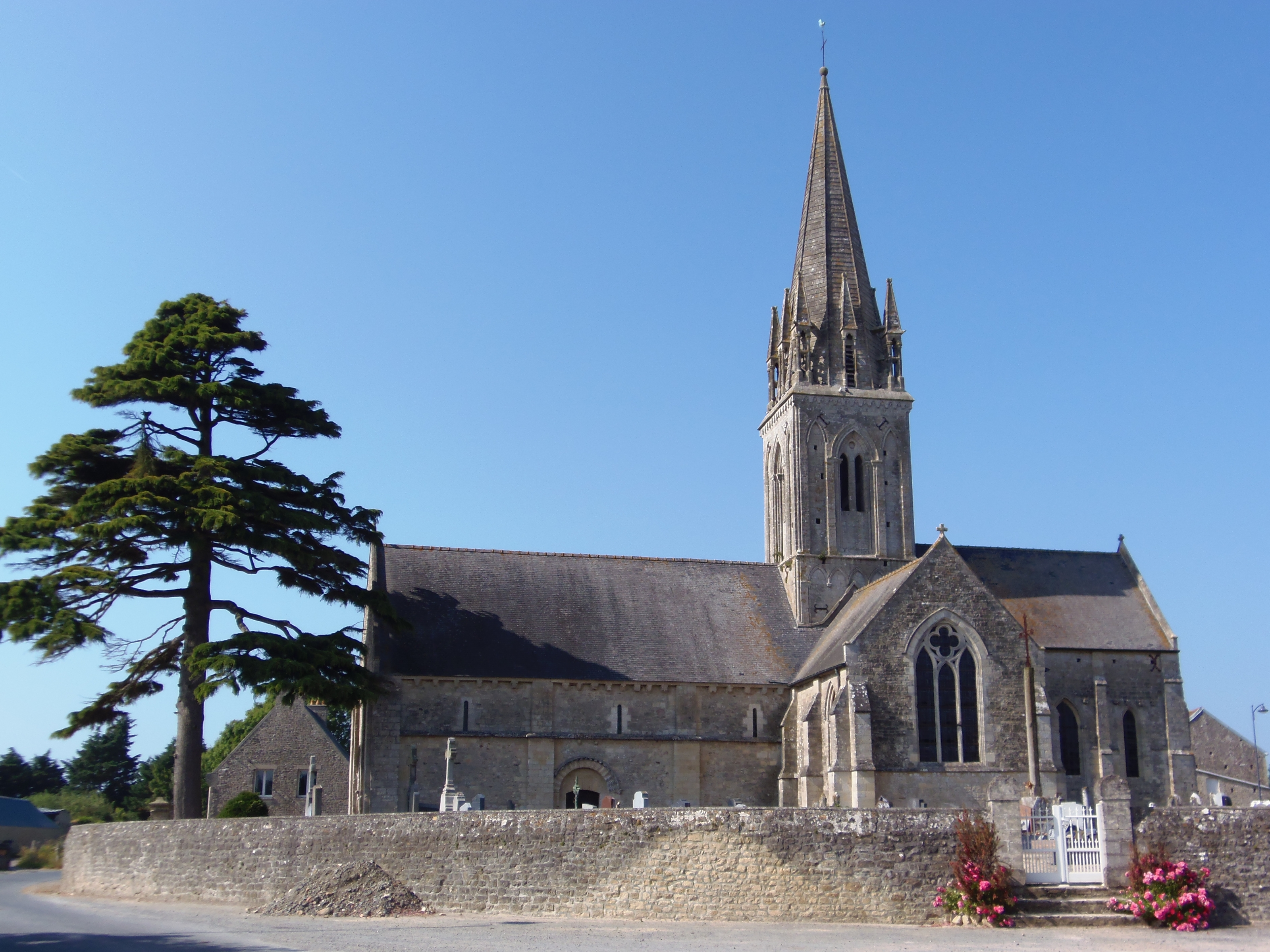 Asnières-en-Bessin (Normandie, France). L'église Saint-Vigor (classée). .